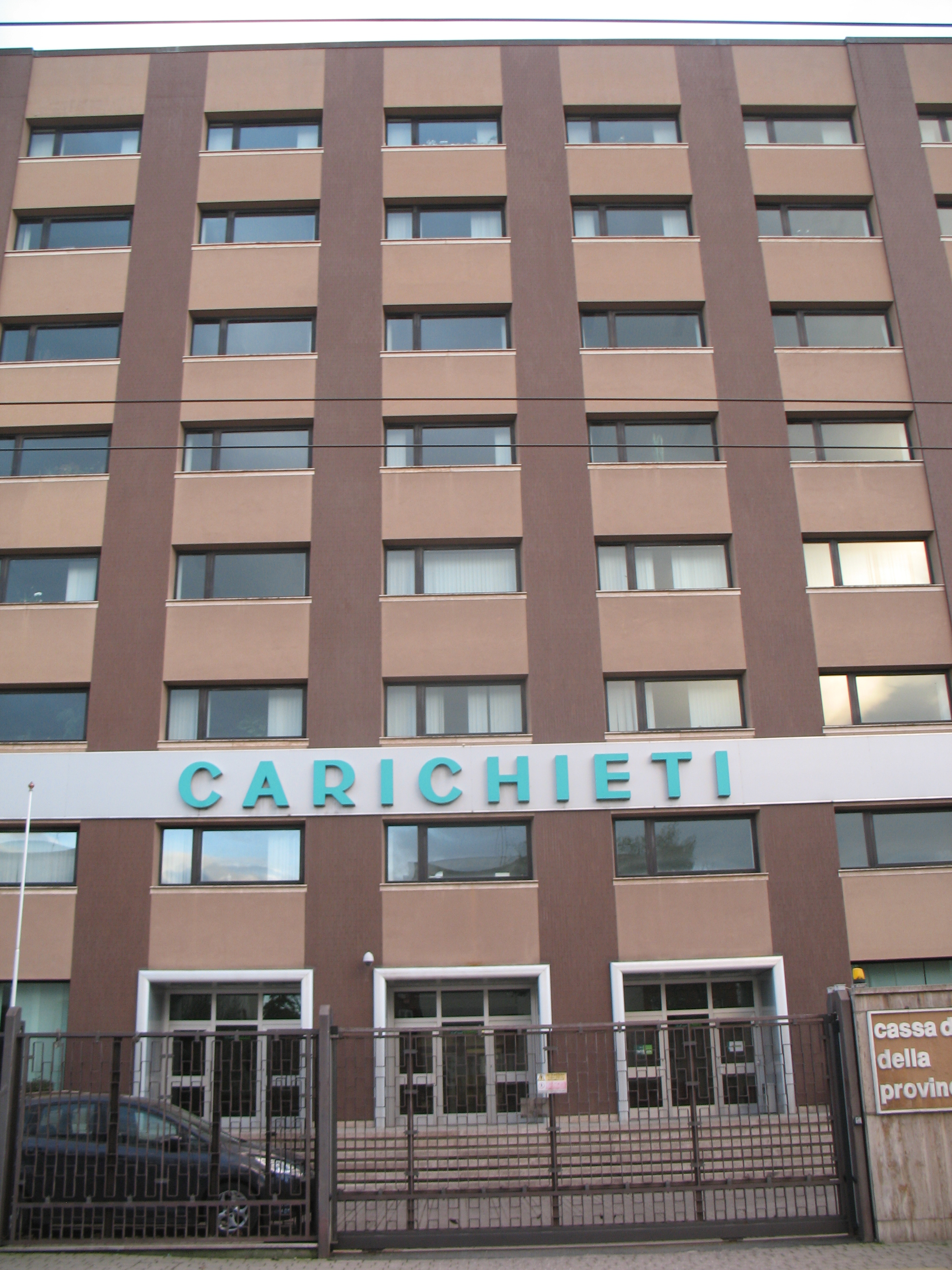 La sede degli uffici amministrativi della Nuova Cassa di Risparmio di Chieti S.p.A. a Chieti Scalo